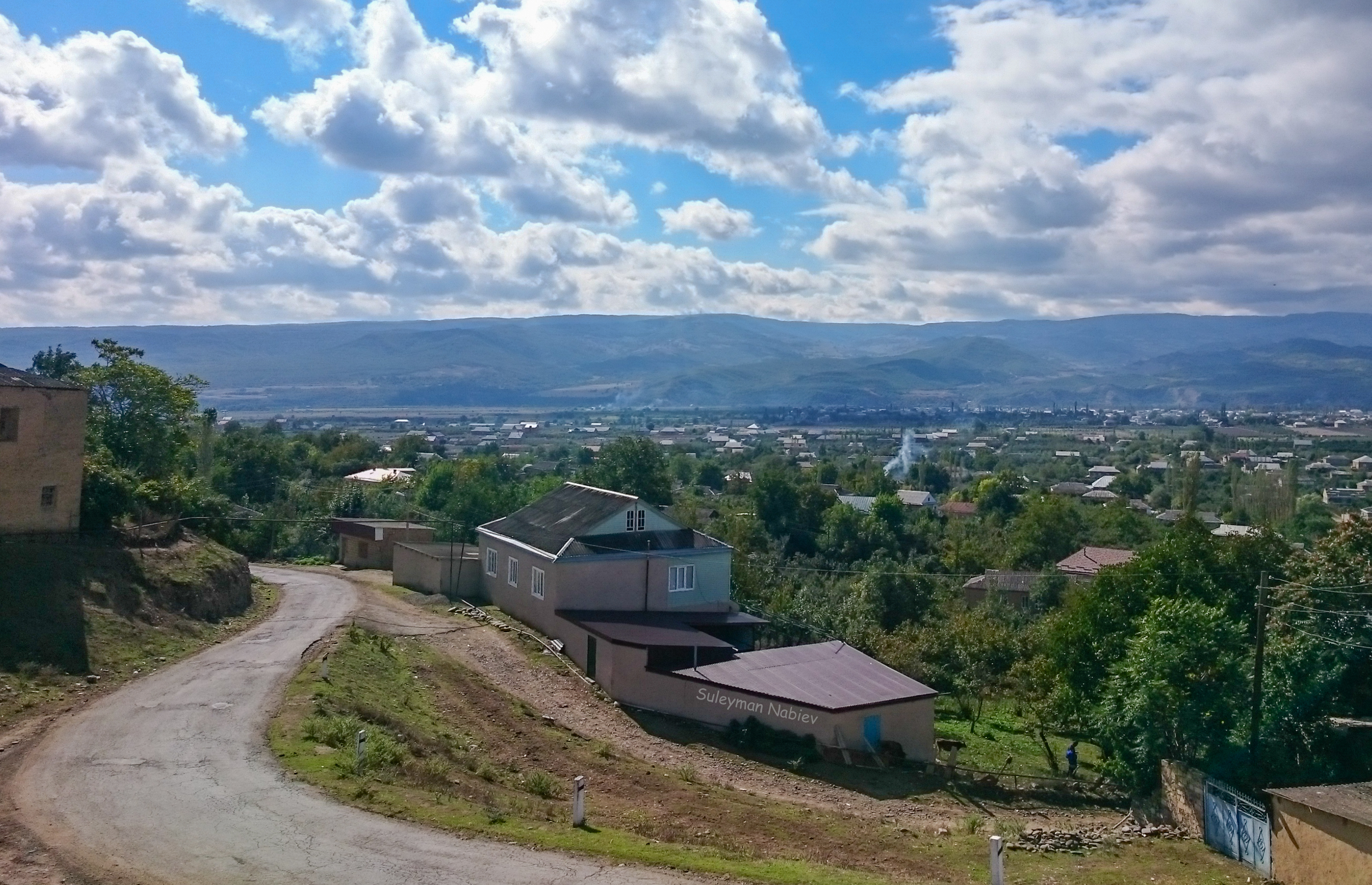 Ашага-Стал